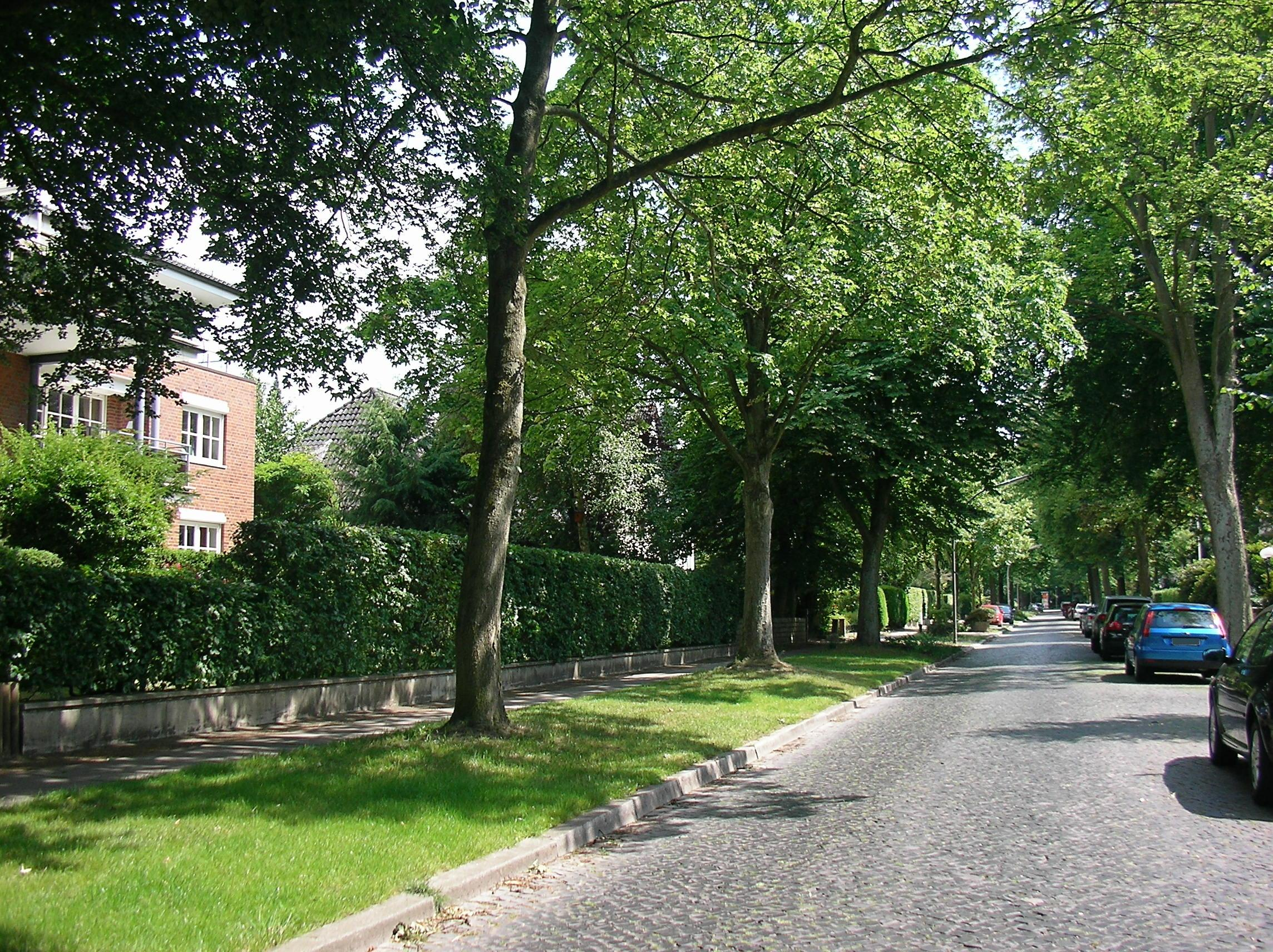 Hamburger Stadtteil Marienthal: Typisches Straßenbild in der Nähe der Marienanlage: ruhige und gepflegte Wohnstraßen